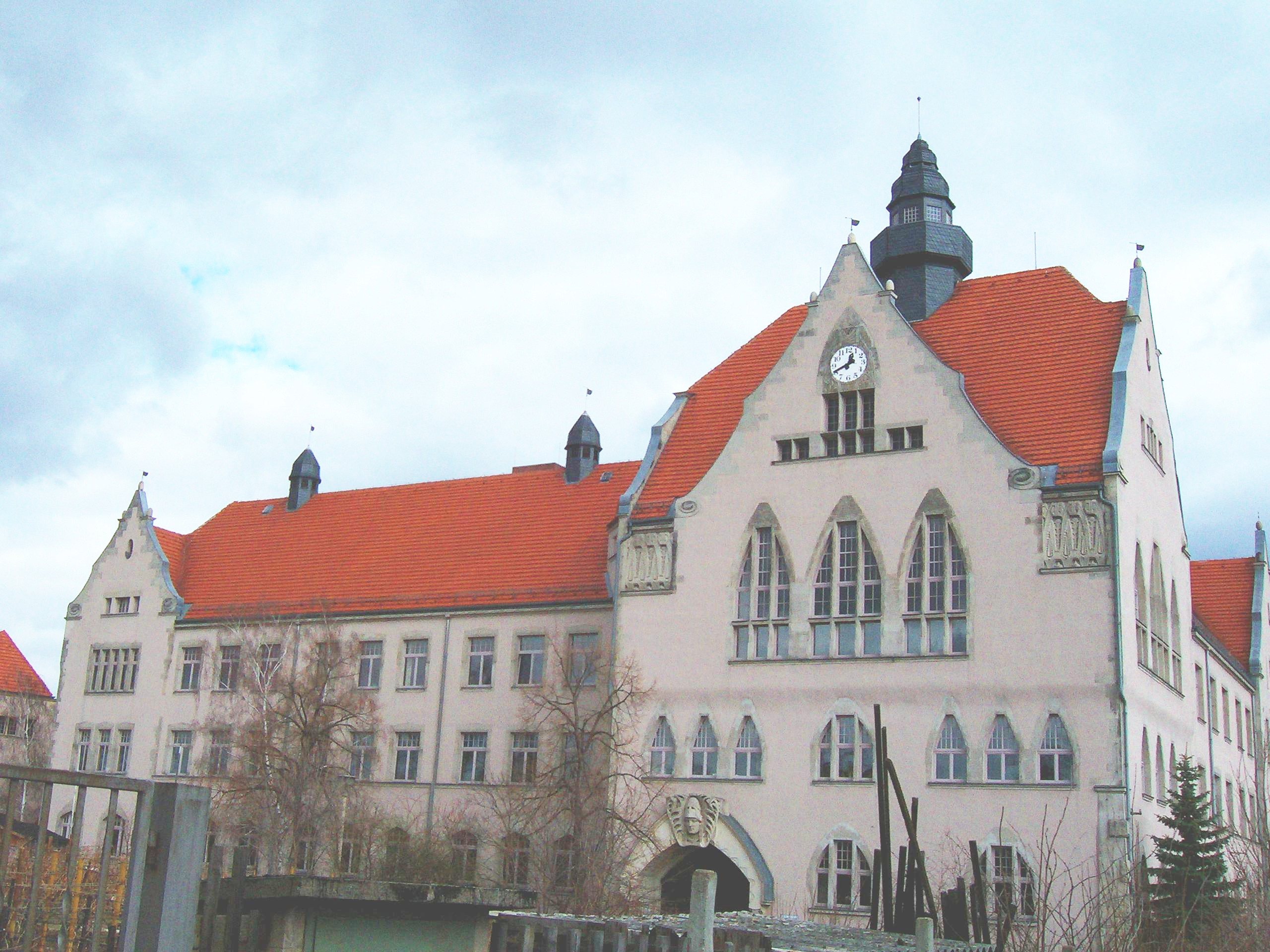 Hauptgebäude des Franziskaneum Meißen